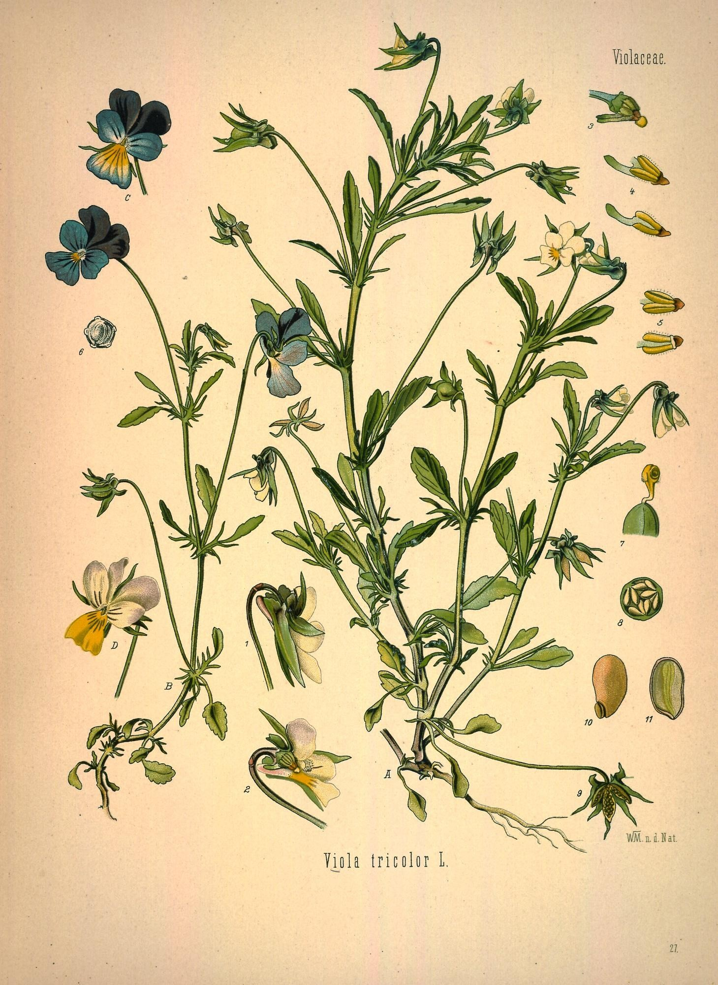 Stiefmütterchen. A B C D Pflanzen und verschiedenfarbige Blüthen in natürl. Grösse; 1 Blüthe, desgl.; 2 dieselbe zerschnitten, desgl.; 3 innere Blüthe, desgl.; 4 gespornte Staubgefässe, vergrössert; 5 ungespornte, desgl.; 6 Pollenkorn unter Wasser, desgl.; 7 oberer Theil des Stempels, desgl.; 8 Fruchtknoten im Querschnitt, desgl.; 9 aufgesprungene Frucht, natürl. Grösse; 10 Same, vergrössert; 11 derselbe im Längsschnitt, desgl.